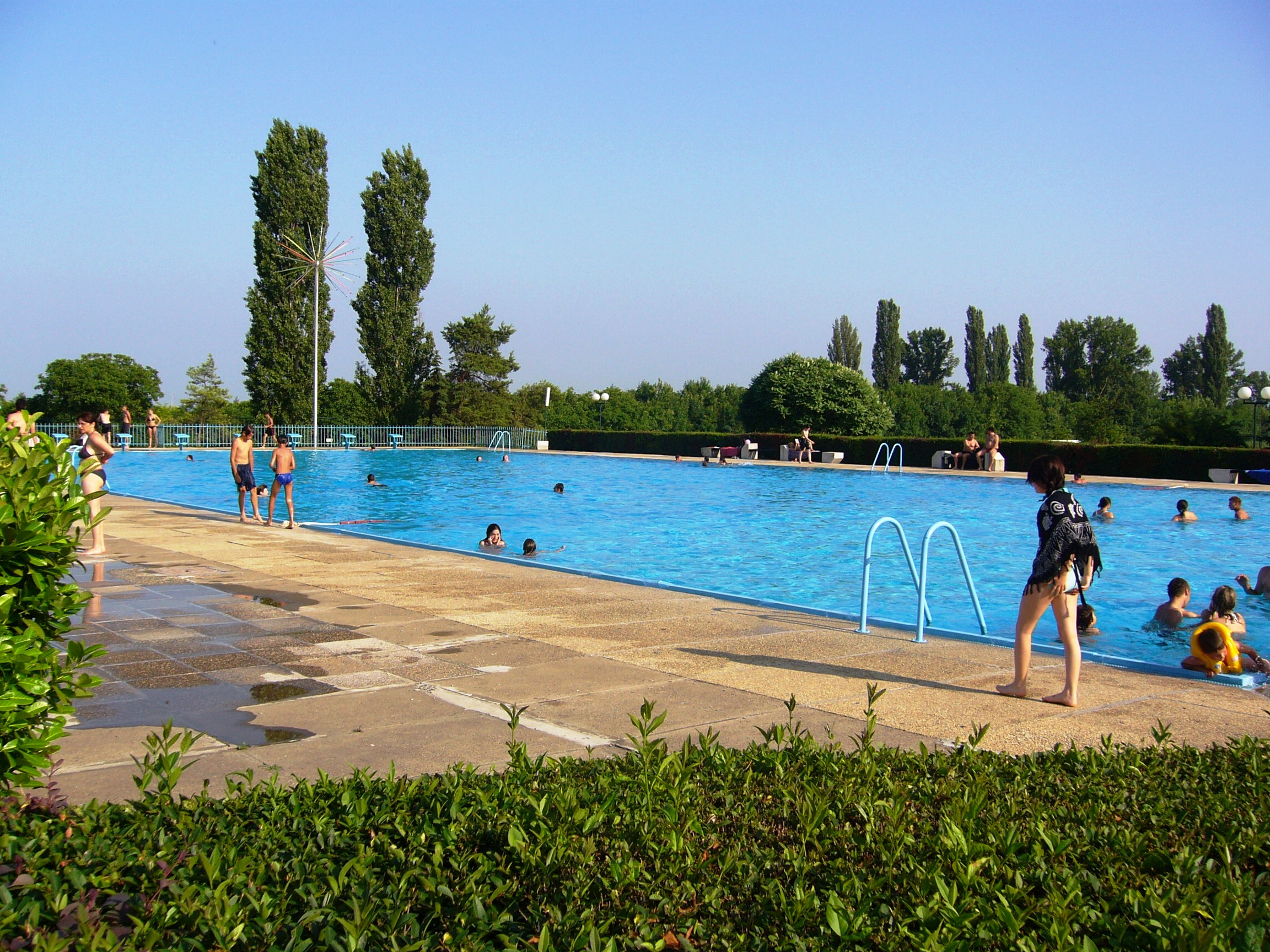 СРЦ Базени - Кнежеви Виногради, Аутор: Бранко Тодоровић